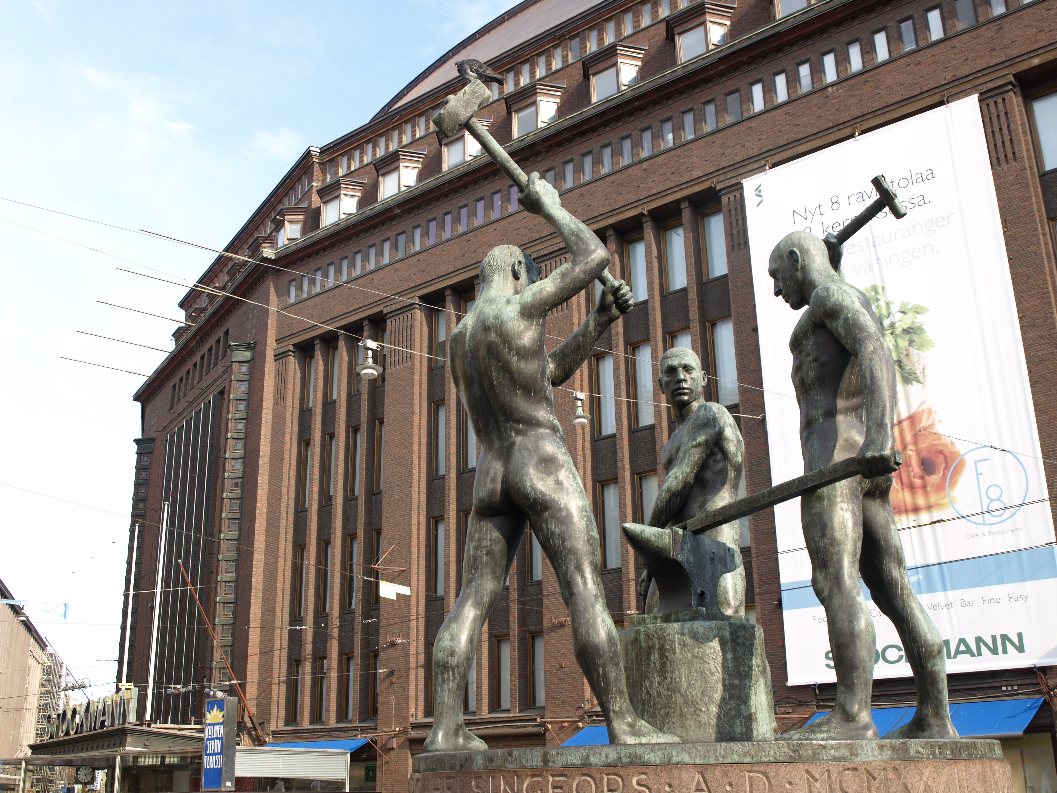 un monumento